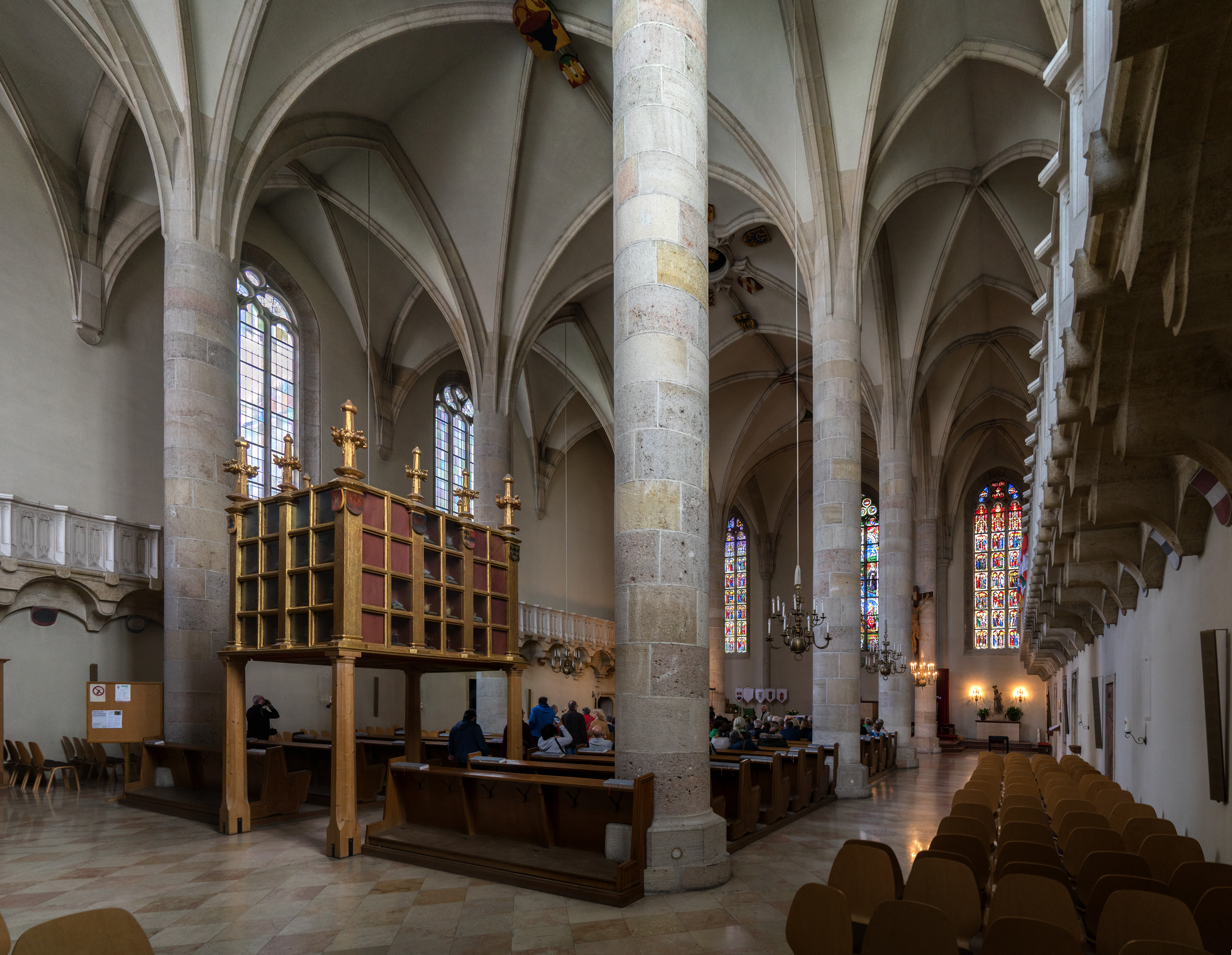 Wiener Neustadt – Theresianische Militärakademie. Wiederaufgebaute Georgskapelle Dieses Bild wurde anlässlich des österreichischen Tags des Denkmals 2017 in Niederösterreich eingereicht. Diese Datei wurde im Rahmen von WikiDaheim 2017 in Österreich erstellt und hochgeladen.Sie wurde dem Themenbereich Denkmalschutz zugeordnet.